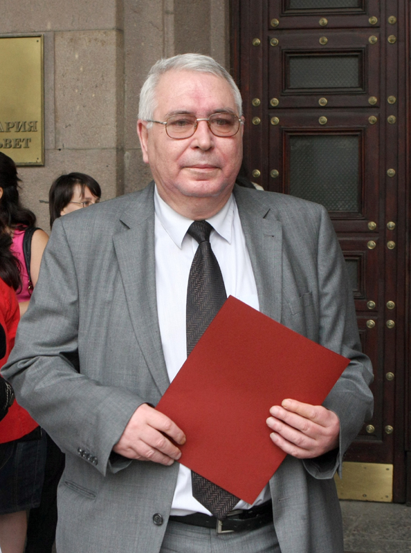 kornezov